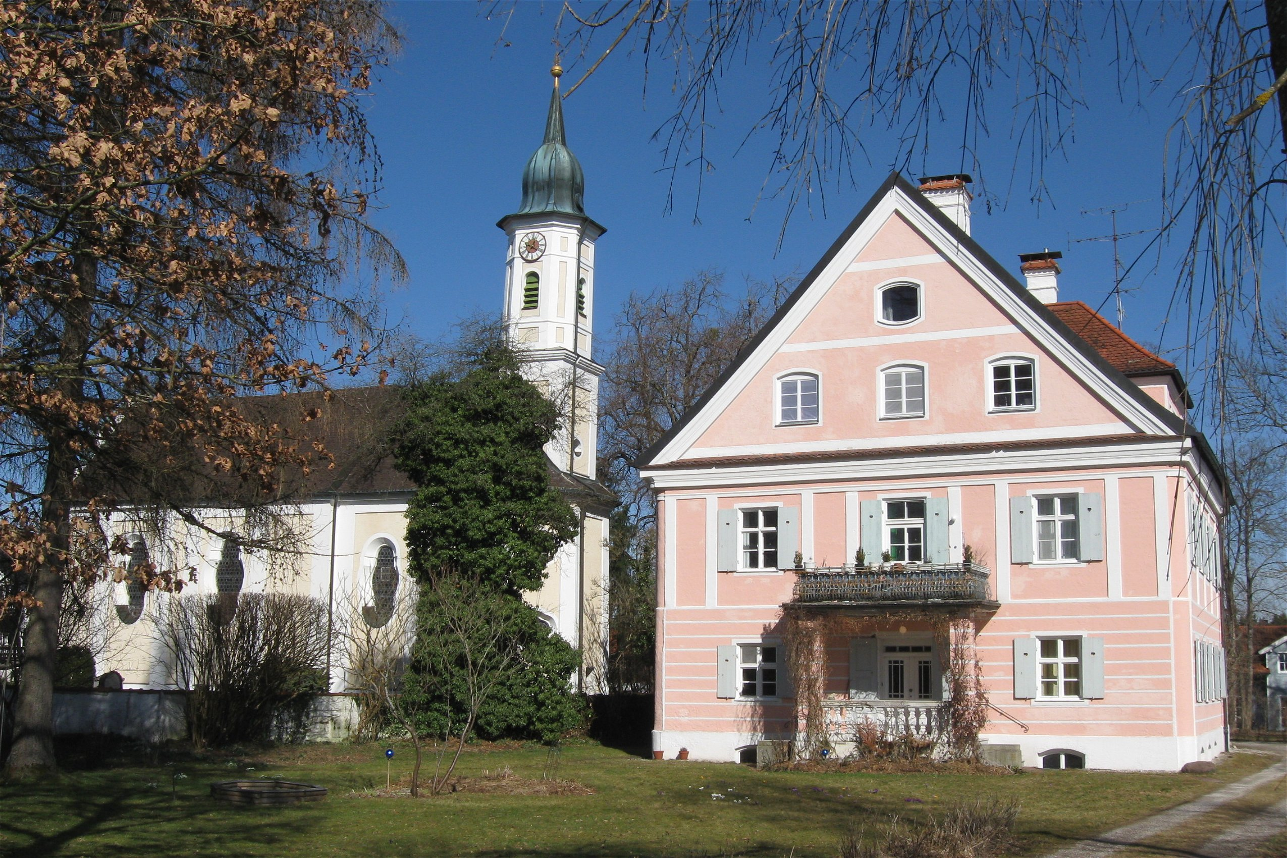 Oberhaching; Kreuzpullach; Wallfahrtskirche Hl. Kreuz, barocker Neubau 1710 von Philipp KöglspergerHaus Nr. 5; Ehem. Benefiziatenhaus, barocker Satteldachbau, 1711